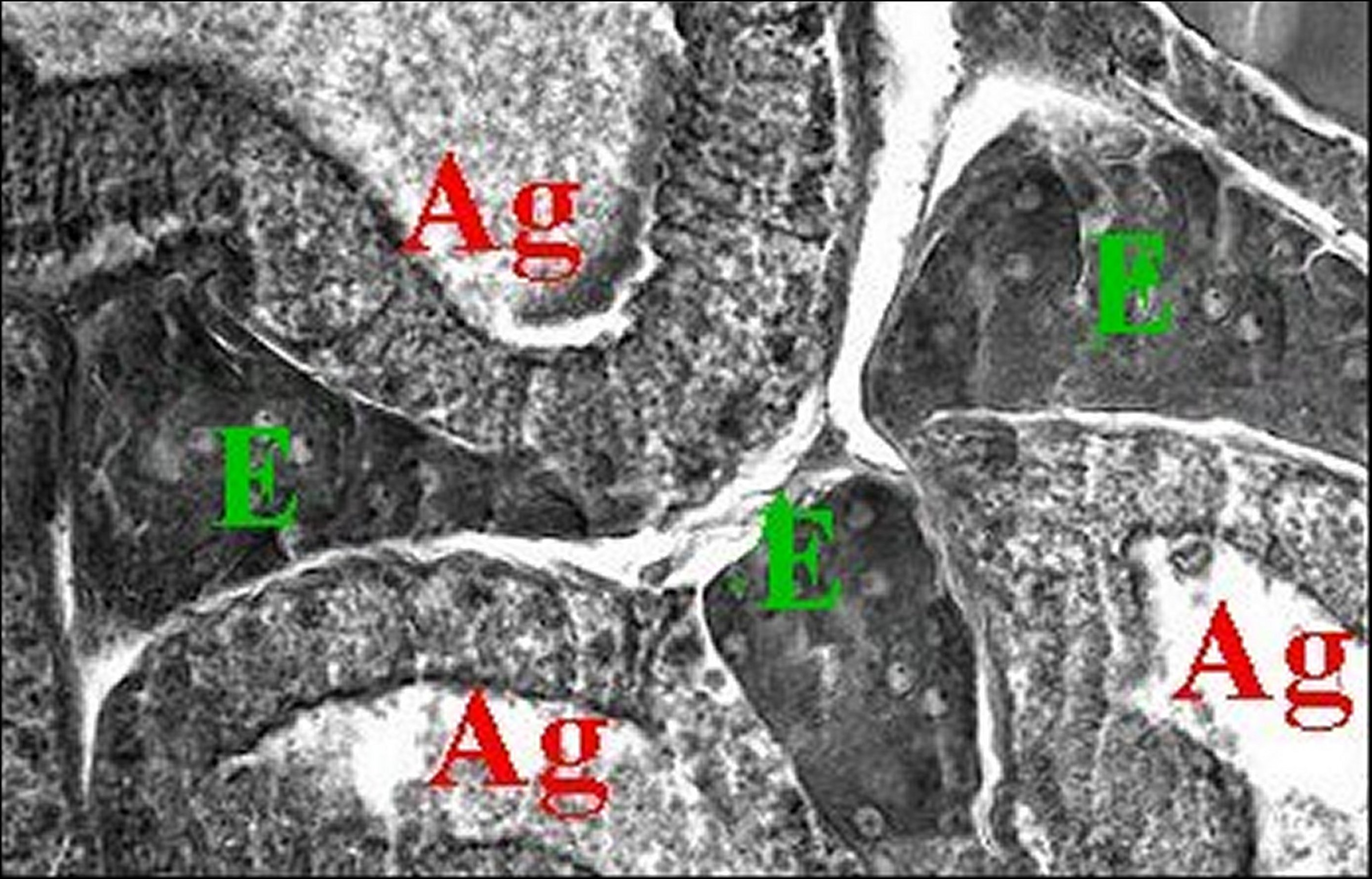 Coupe histologique d'abdomen de Poecilopachys montrant le tissu endocrinoïde